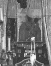 Ікона Заславської Богородиці.